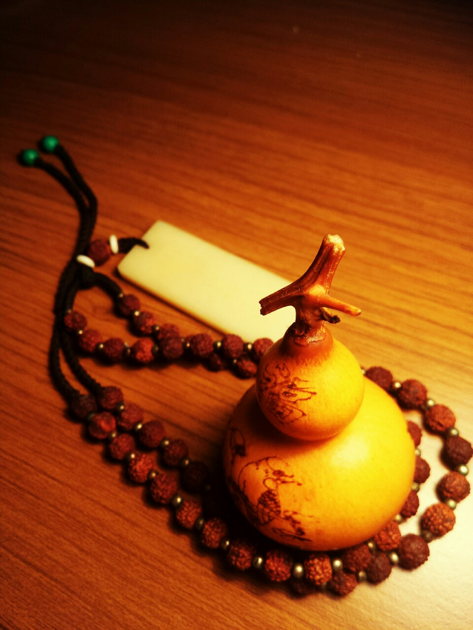 中文（中国大陆）: 烫花葫芦艺术品